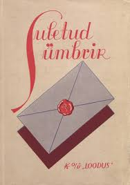 Raamat - Suletud ümbrik 1934